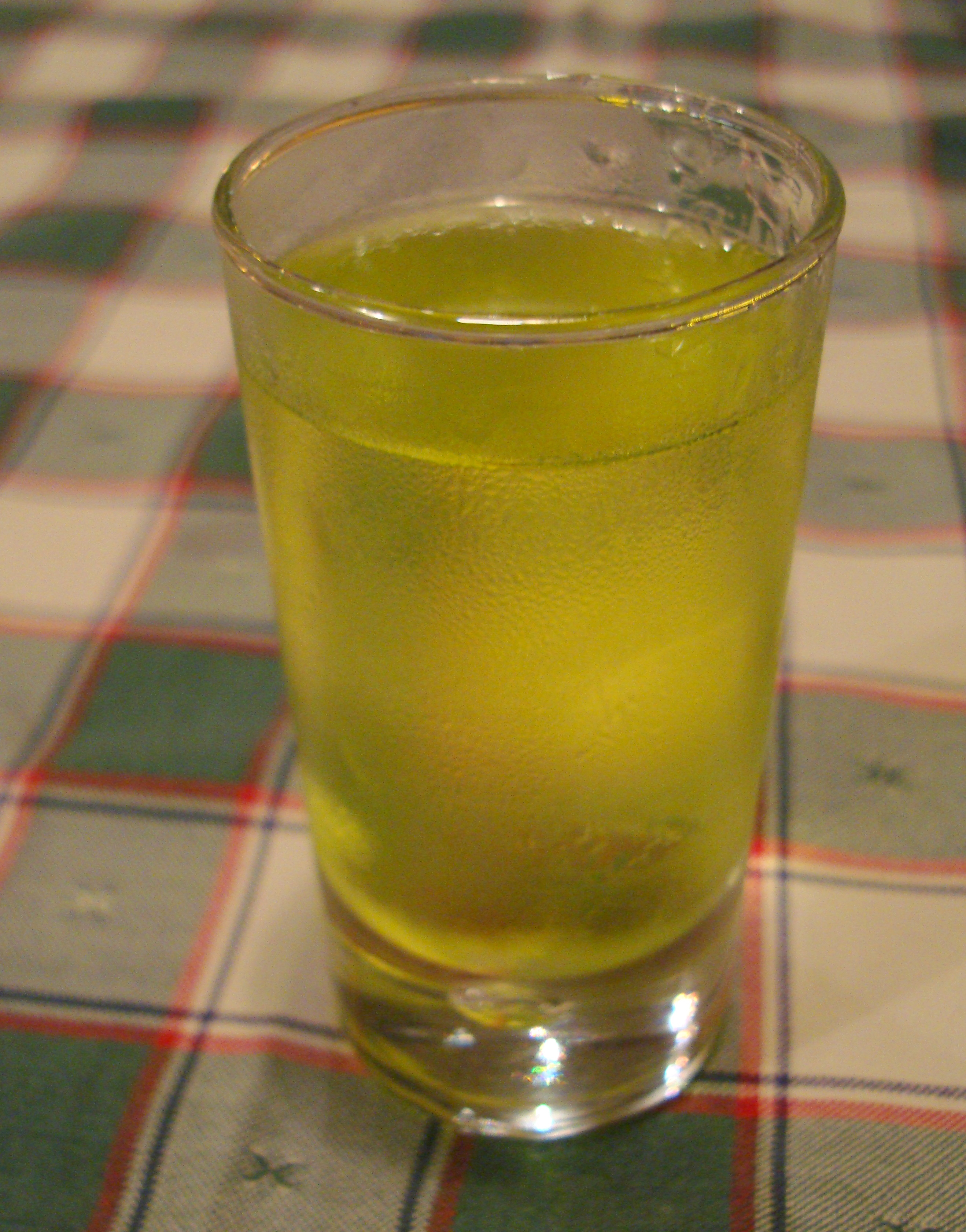 Ein Glas des Kräuterlikörs „Orujo de hierbas“